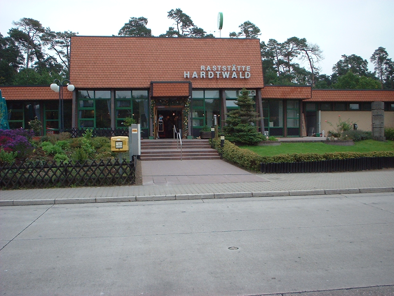 Bundesautobahn-Raststätte Hardtwald auf der A5 Nähe Heidelberg